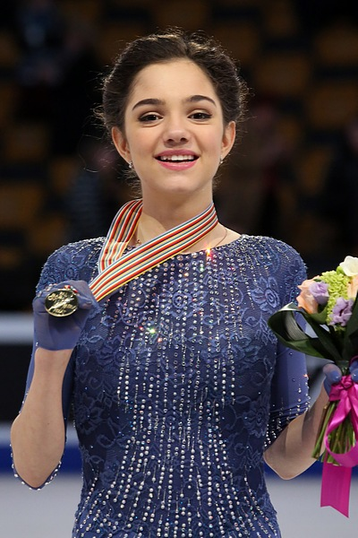 Евгения Медведева на подиуме чемпионата мира 2016